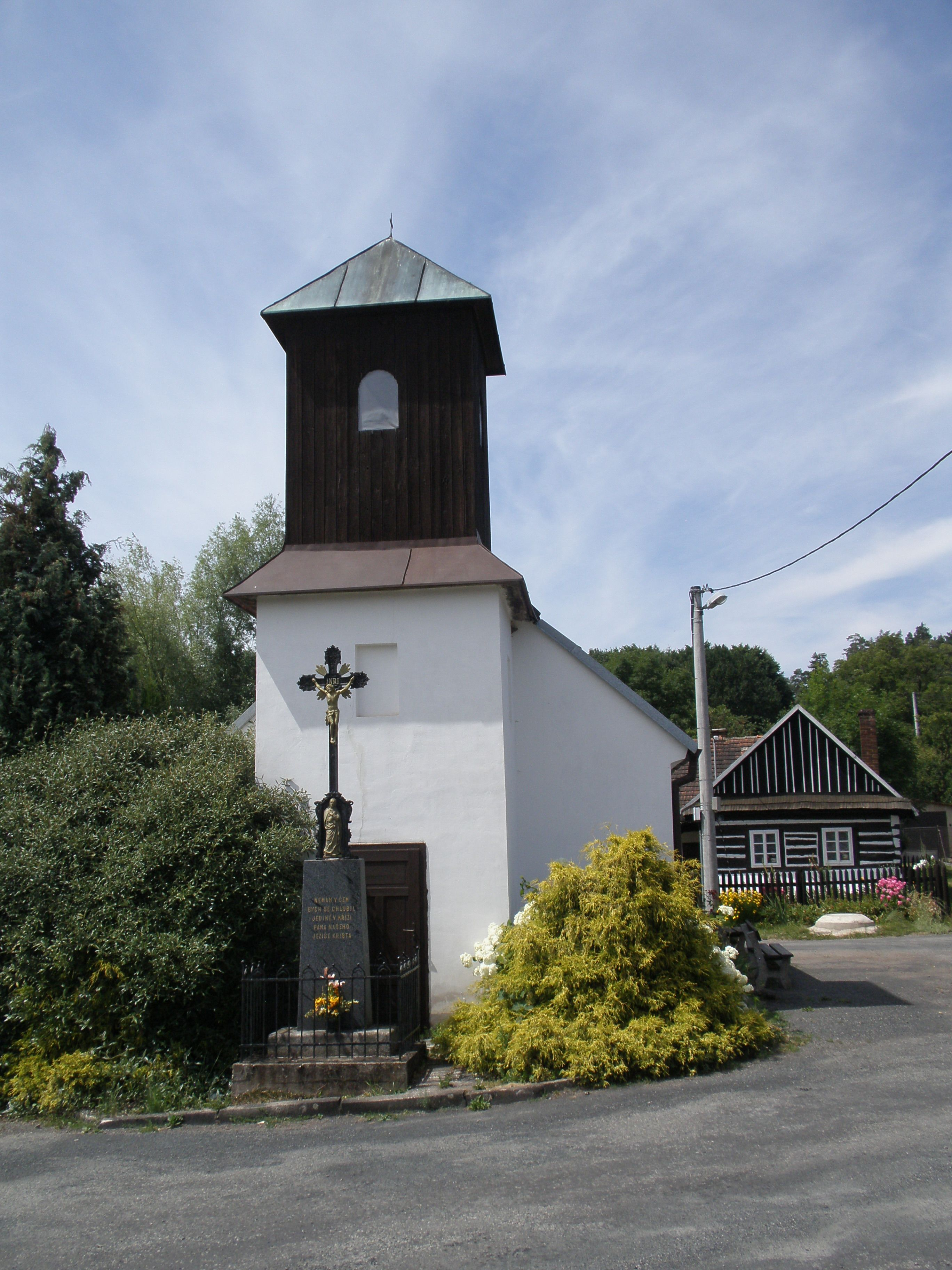 Kaple ve vesnici Novičí, která je součástí města Letovice